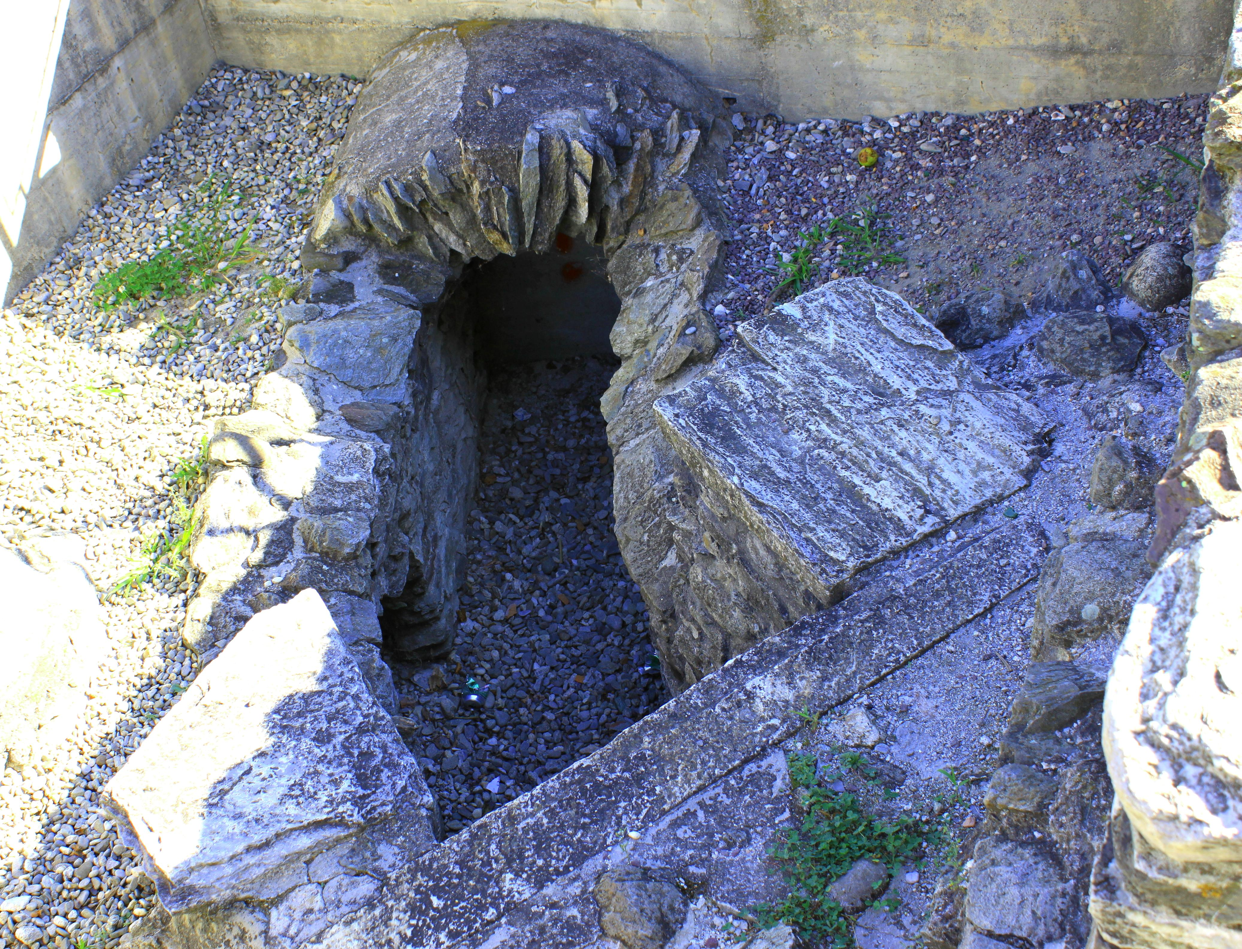 Suisse, canton du Valais, Martigny, ville romaine et moderne, vestiges de canalisations romaines.